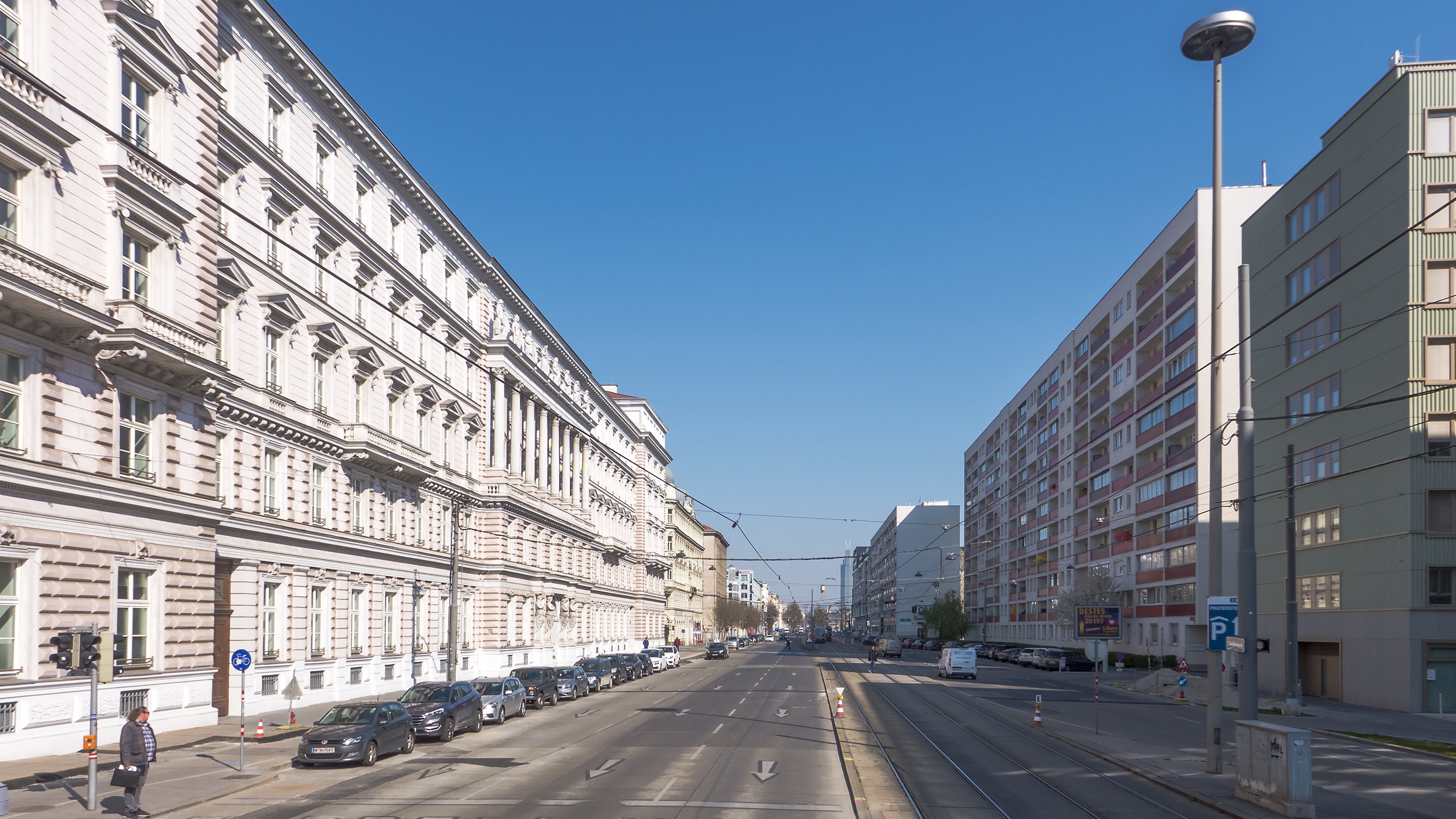 Nordbahnstraße in Wien 2 bei der Kleinen Stadtgutgasse Richtung Norden